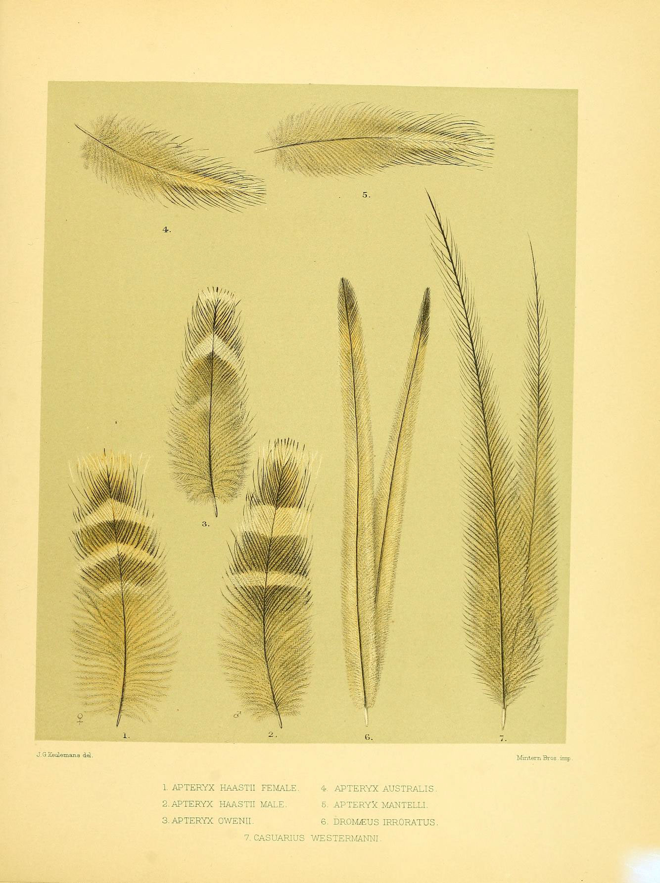 J.GKeulemsLna del. Mintem Bros - imp . 1. APTERYX HAASTII FEMALE. 2.APTERYX HAASTII MALE. 3. APTERYX OAVENII. 4- APTERYX AUSTRALIS. 5. APTERYX MANTELLI. 6. DROlvMlUS IRRORATUS. 7. CASUARIUS WESTERMANNI.